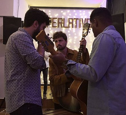 Pablo A. Martín, Miguel Polonio y Fernando Lima preparándose antes de un concierto en formato acústico el 21 de octubre de 2018 en el Superlativo Bar de Madrid.